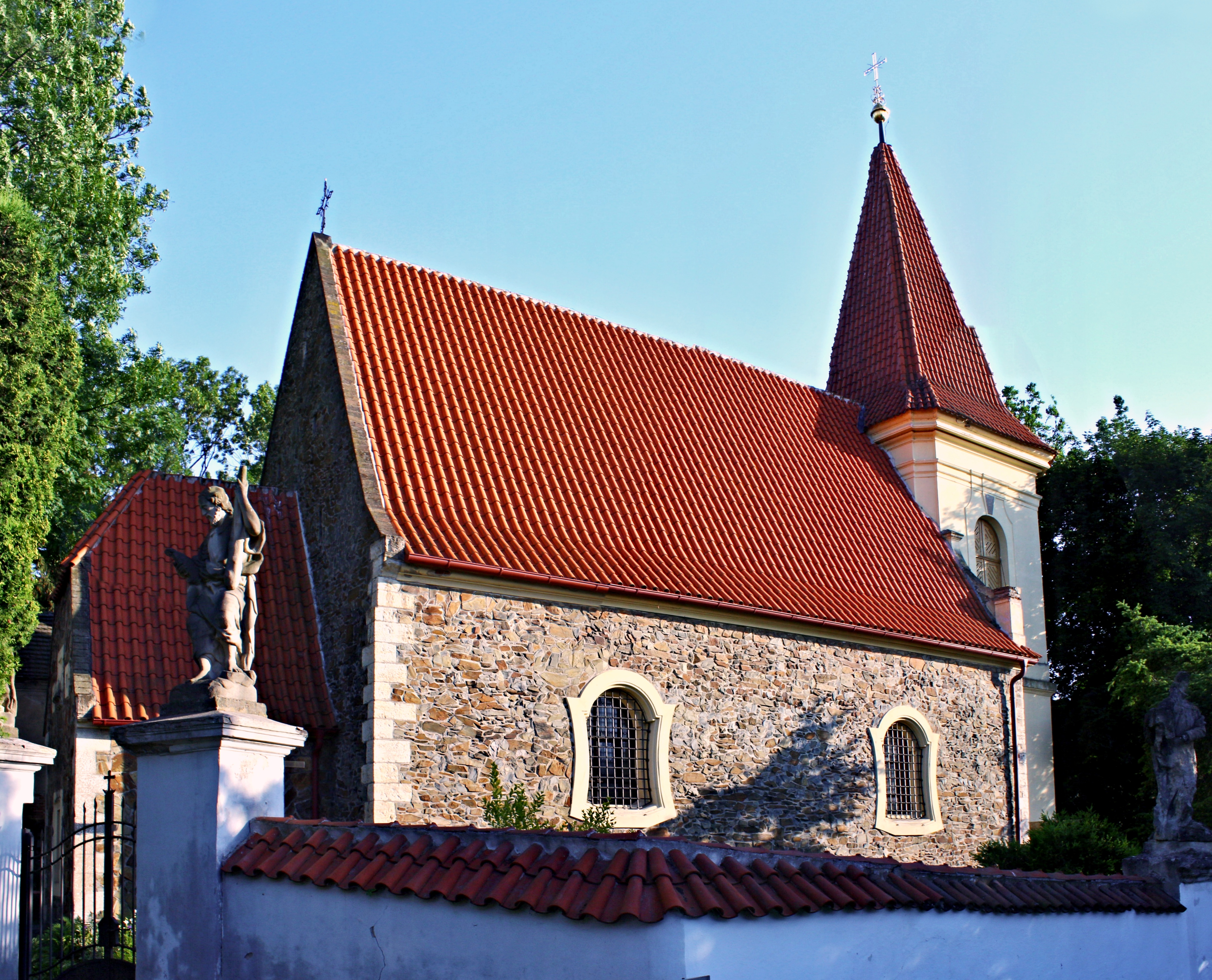 Praha 10-Petrovice, kostel svatého Jakuba Staršího